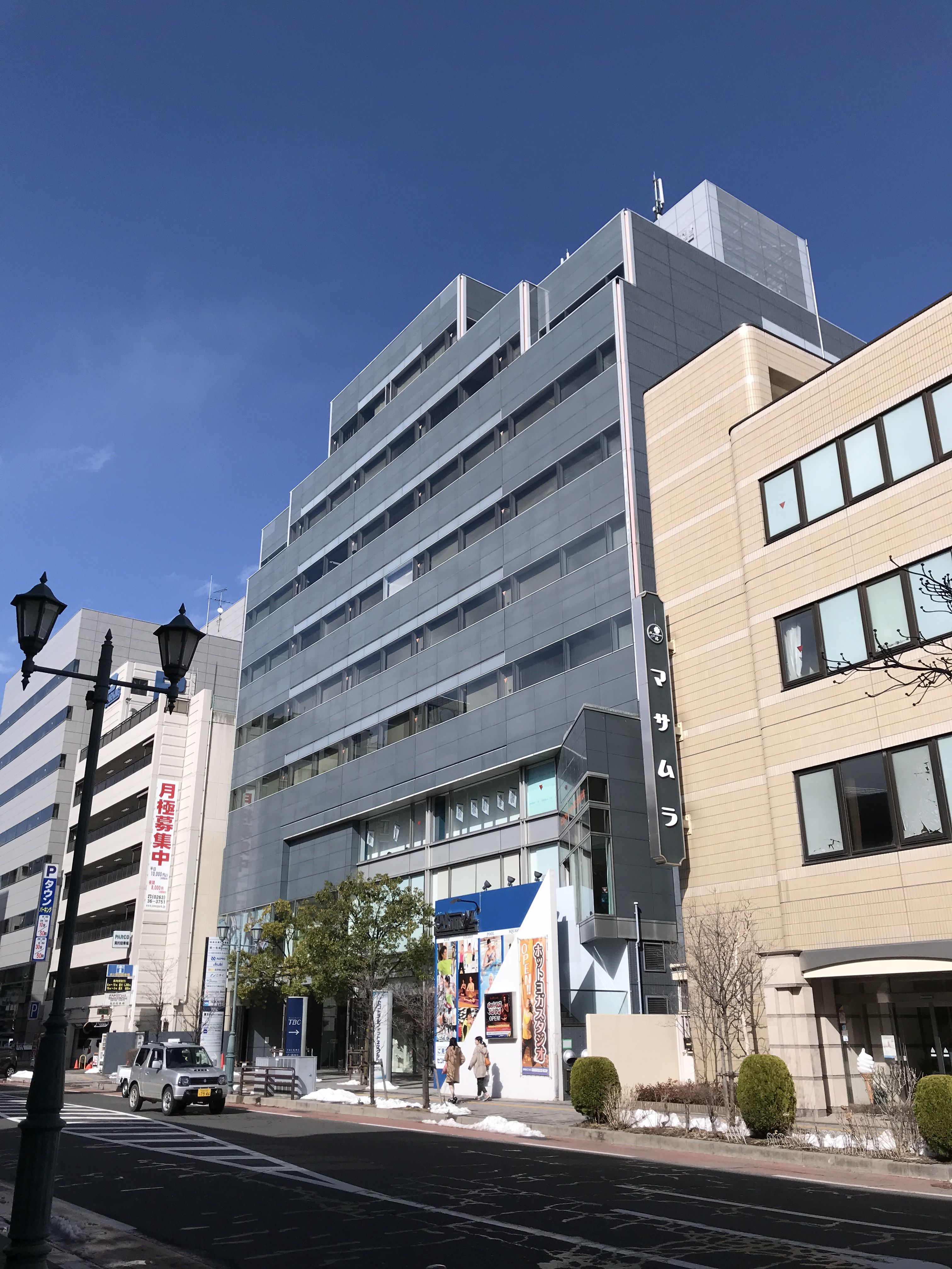 長野朝日放送や、第一生命松本支社、松本土建株式会社、エステティックTBCなどが入居する松本第一ビル。